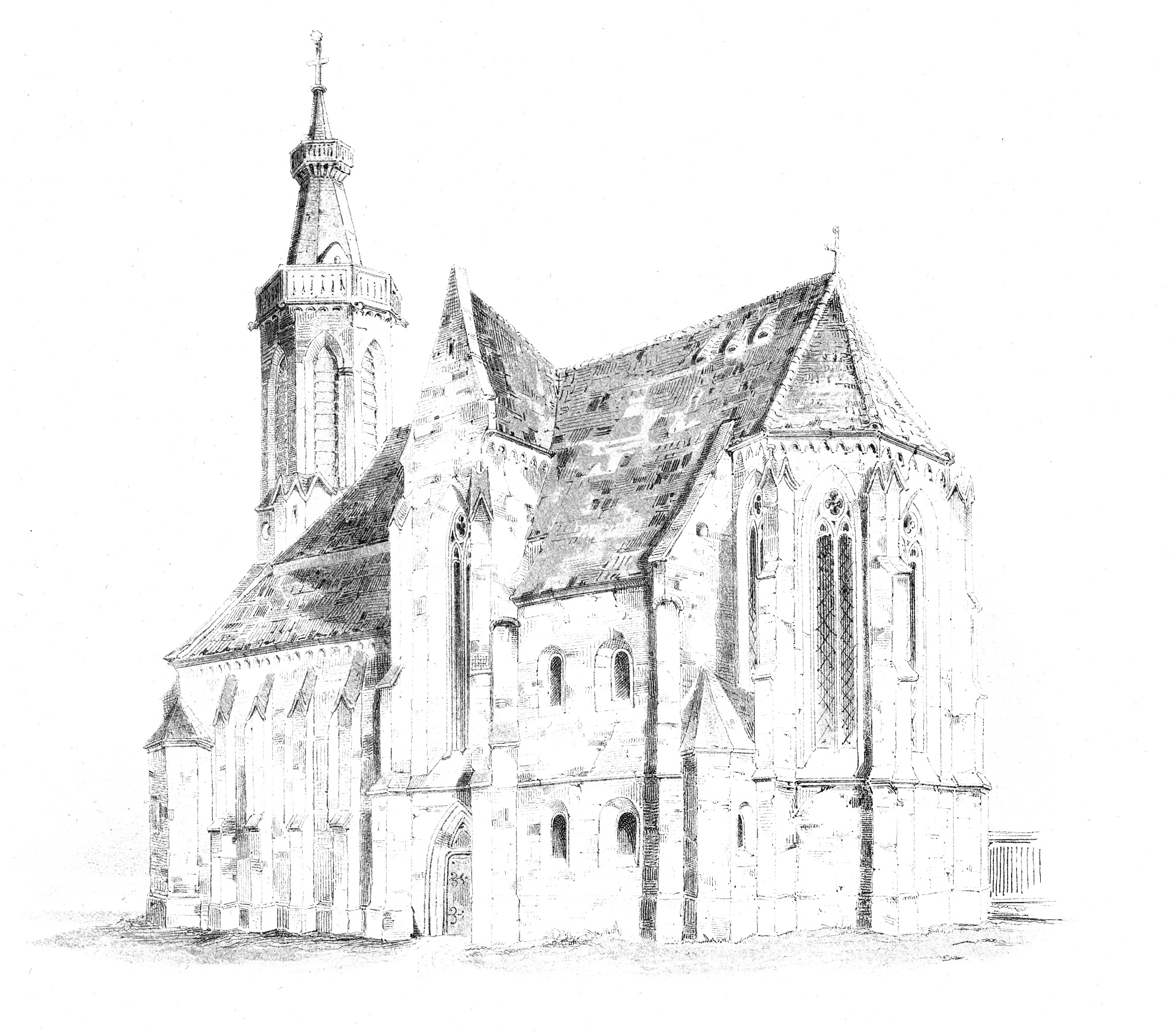 Bilder aus dem in derselben Kategorie befindlichen Artikel aus den Mittheilungen der kaiserl. königl. Central-Commission zur Erforschung und Erhaltung der Baudenkmale Band 1, 1856. This is a photo of a monument in Hungary, Identifier: 4915